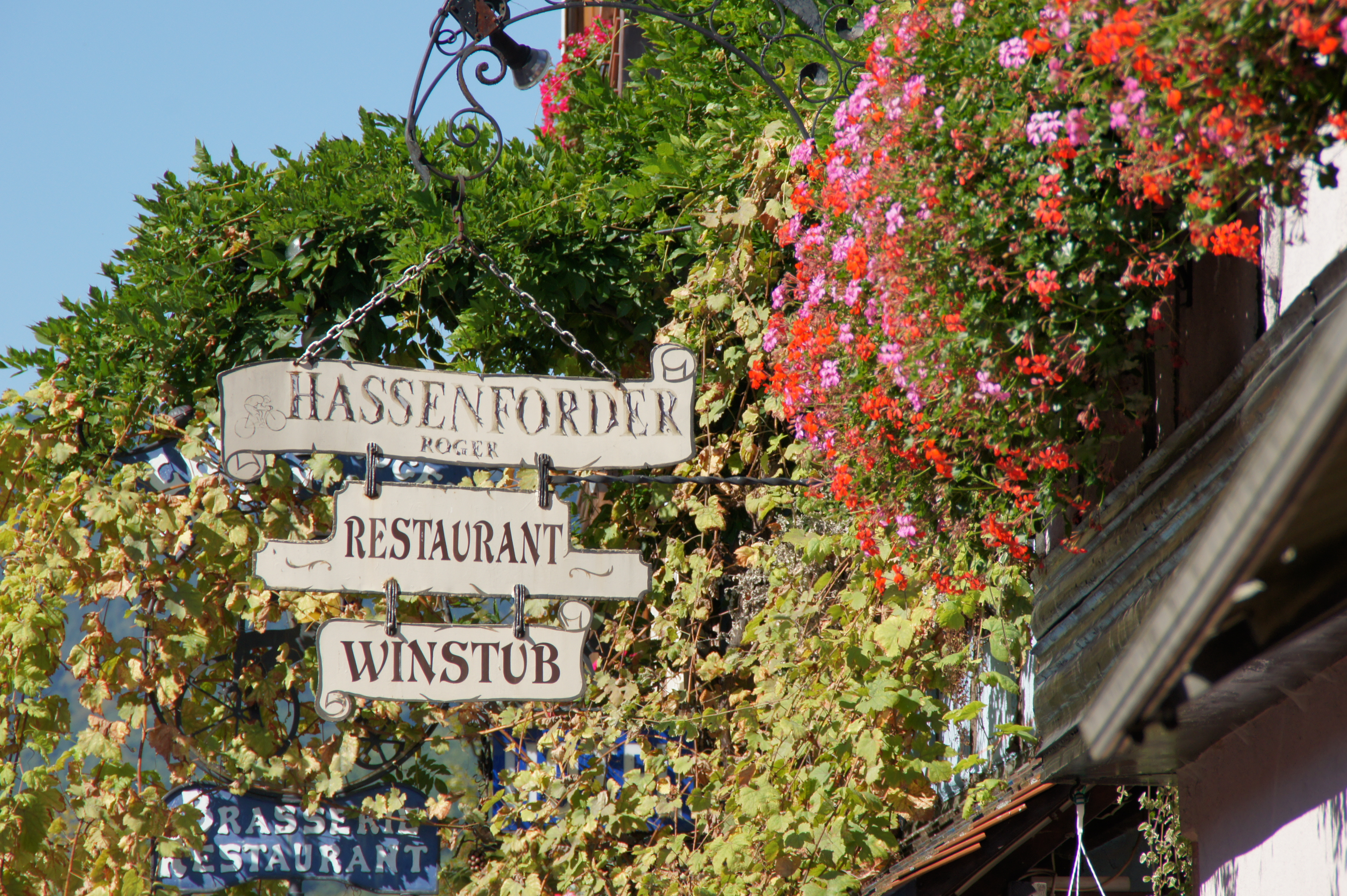 Enseigne du restaurant du coureur cycliste Roger Hassenforder à Kaysersberg